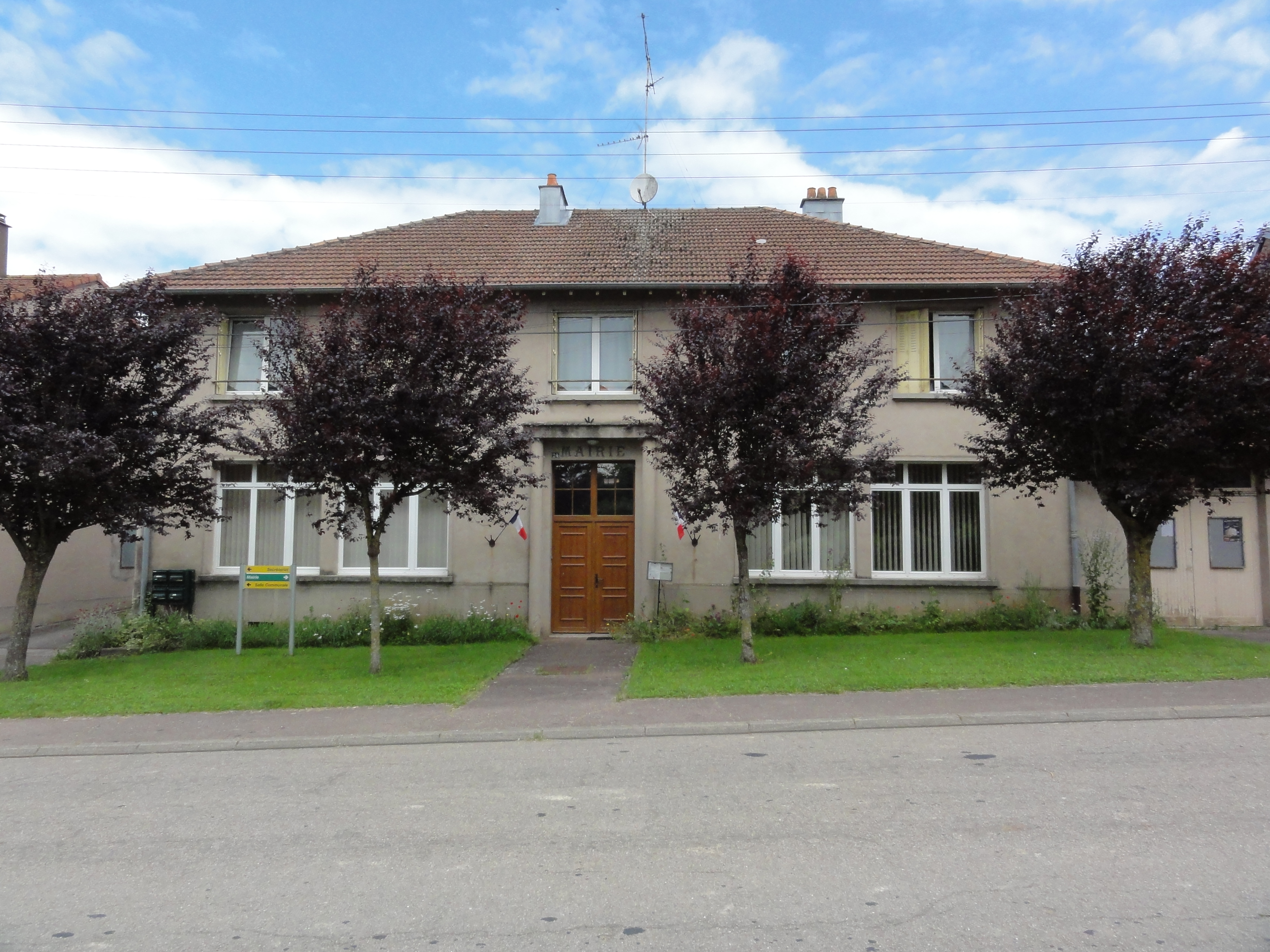 Amenoncourt (M-et-M) mairie